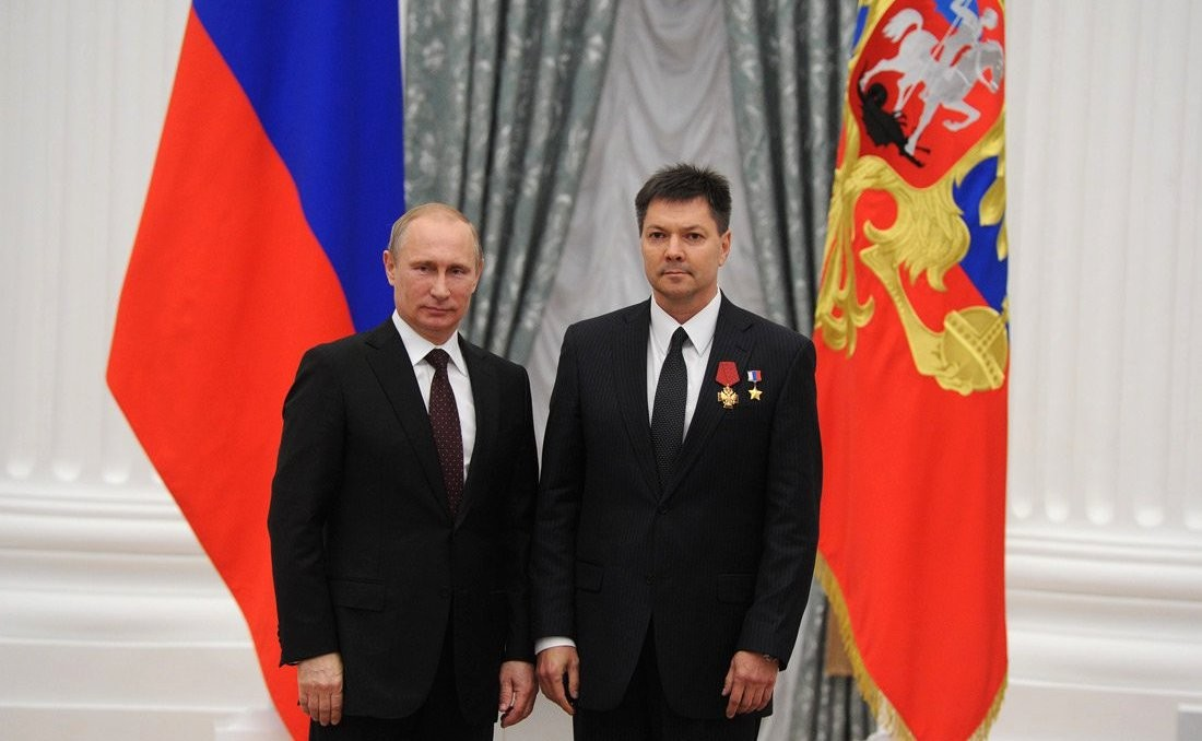 Орденом «За заслуги перед Отечеством» IV степени награждён Олег Кононенко